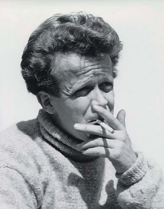 Danish designer Kristian Solmer Vedel.